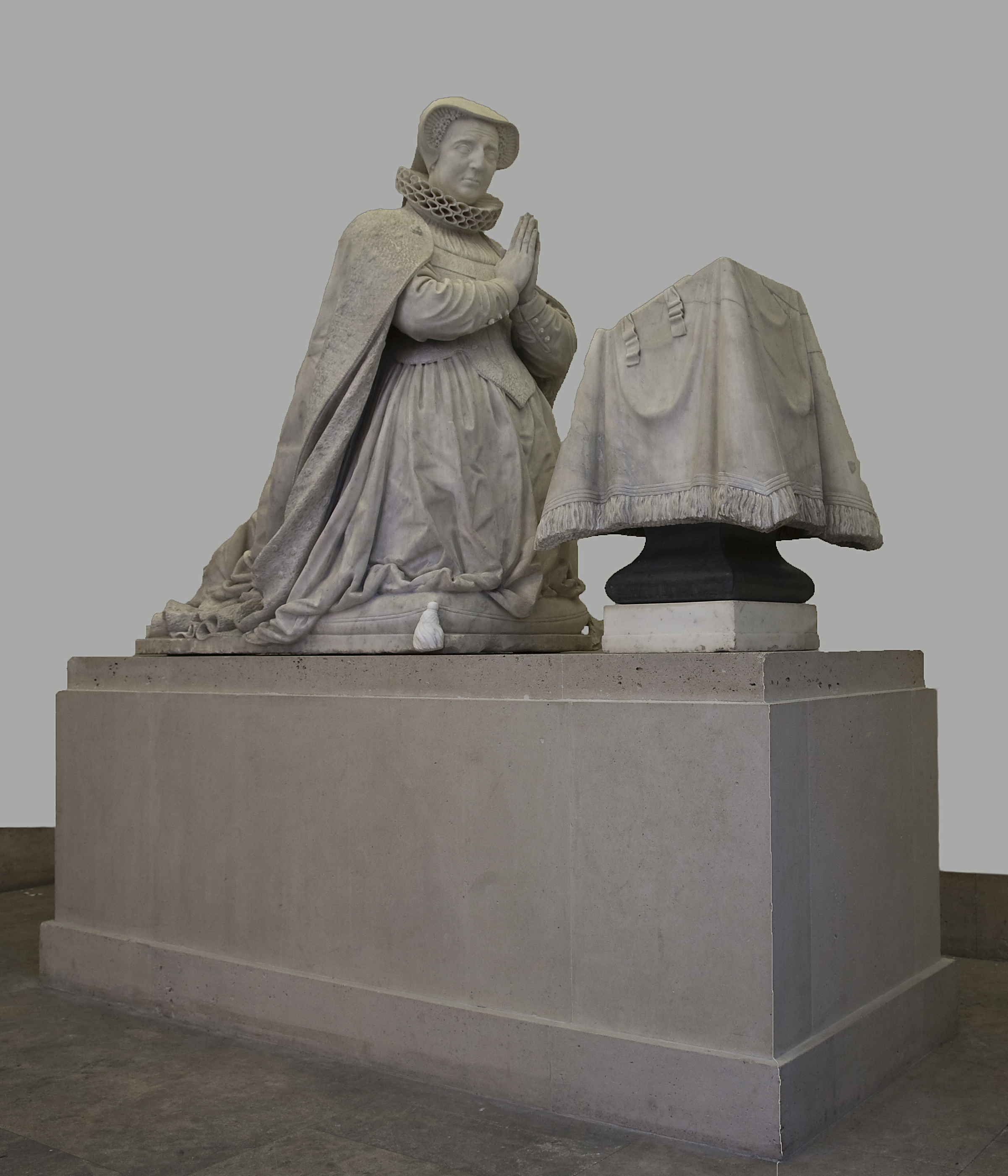 Statue se trouvant dans le pavillon de la Bibliothèque historique de la ville de Paris, France.